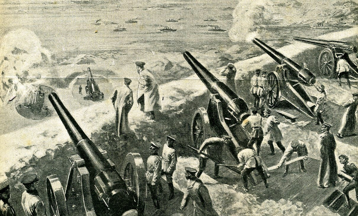 Le premier bombardement de Port Arthur vu des fortifications russes Le fort du premier plan est celui des forts de Houang-Chin-San sur la hauteur qui commande de côté de l'Est , l'entrée du port